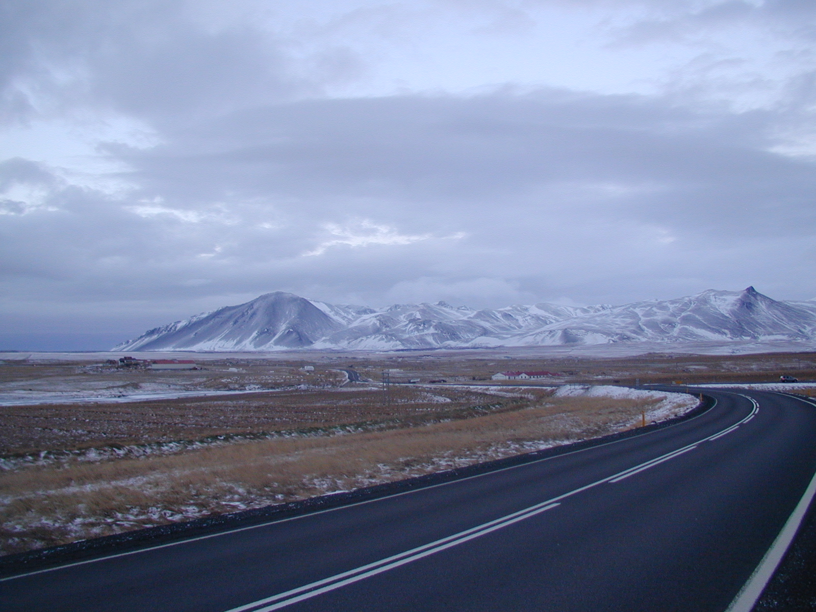 Snæfellsnes in Winter. Rauðamelsfjall.